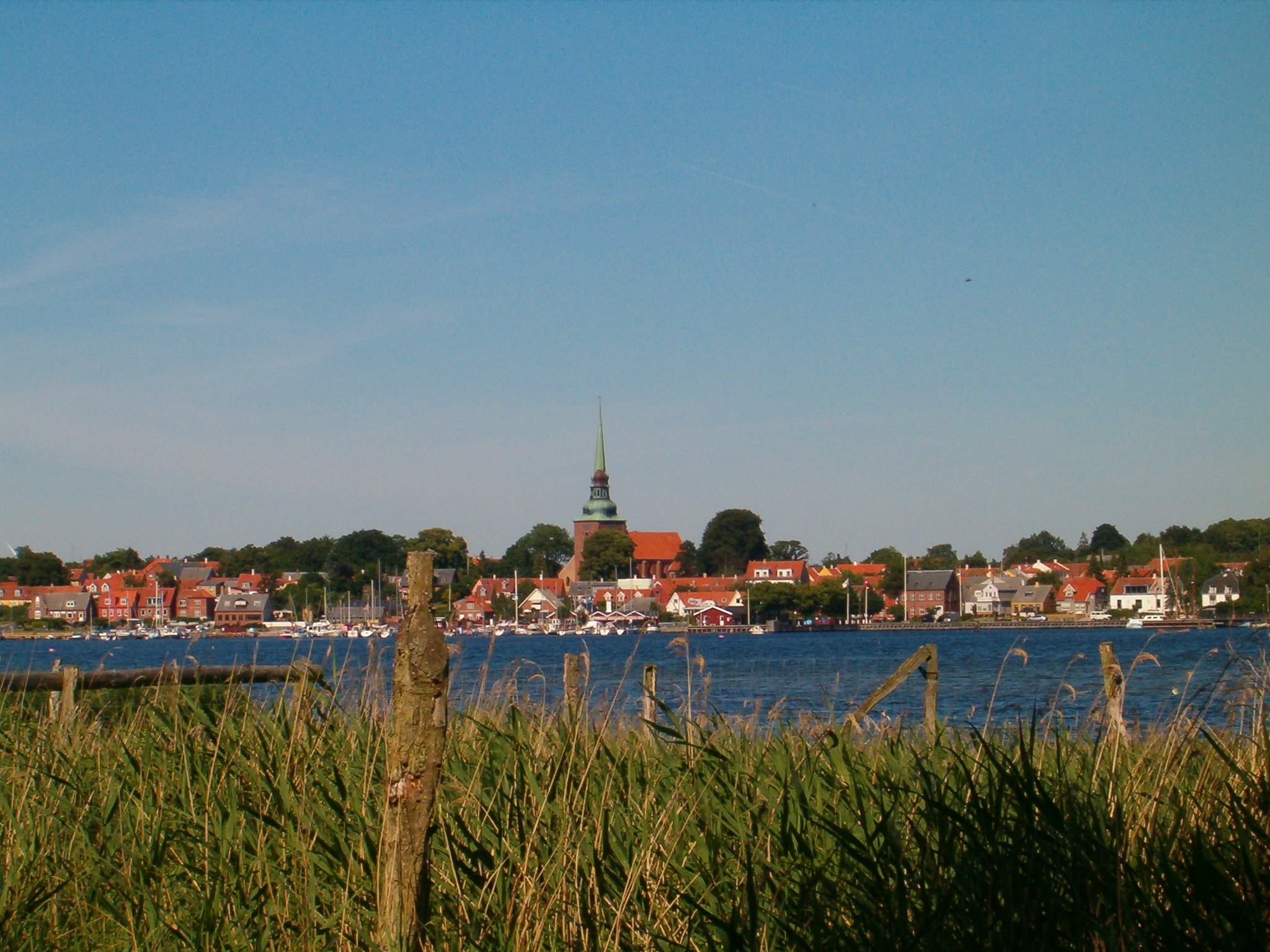 Panorama over Nysted set fra vest hen over Nysted Nor